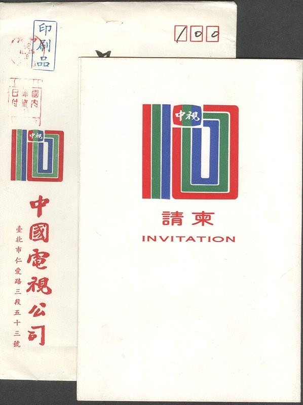 中文（台灣）: 中國電視公司開播十週年紀念茶會請柬及其信封。